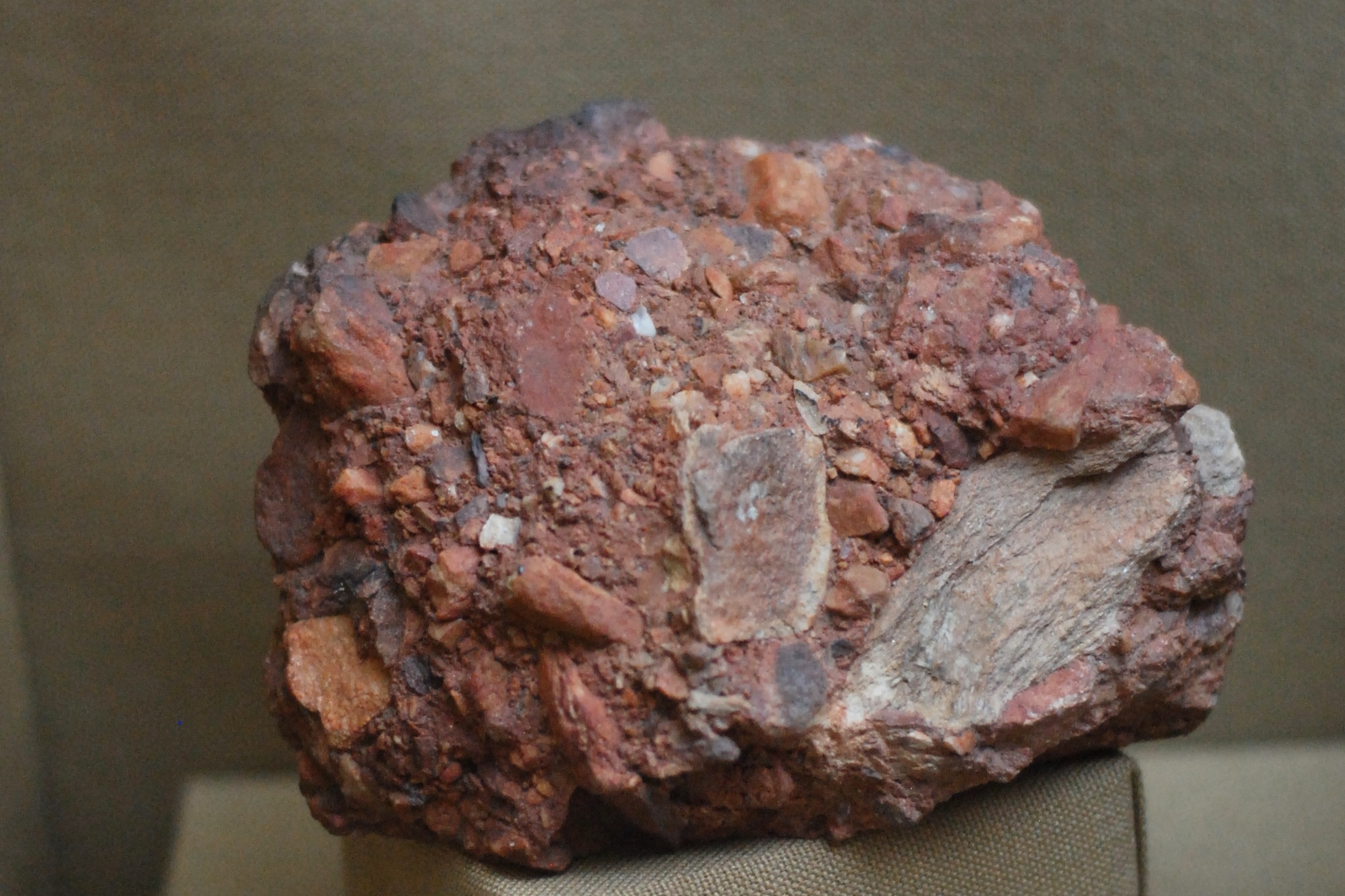 Brecha. Roca sedmientaria detrítica, Fragmentos angulosos de rocas consolidados sin transporte, Sierra de la Ventana, Buenos Aires, Argentina.